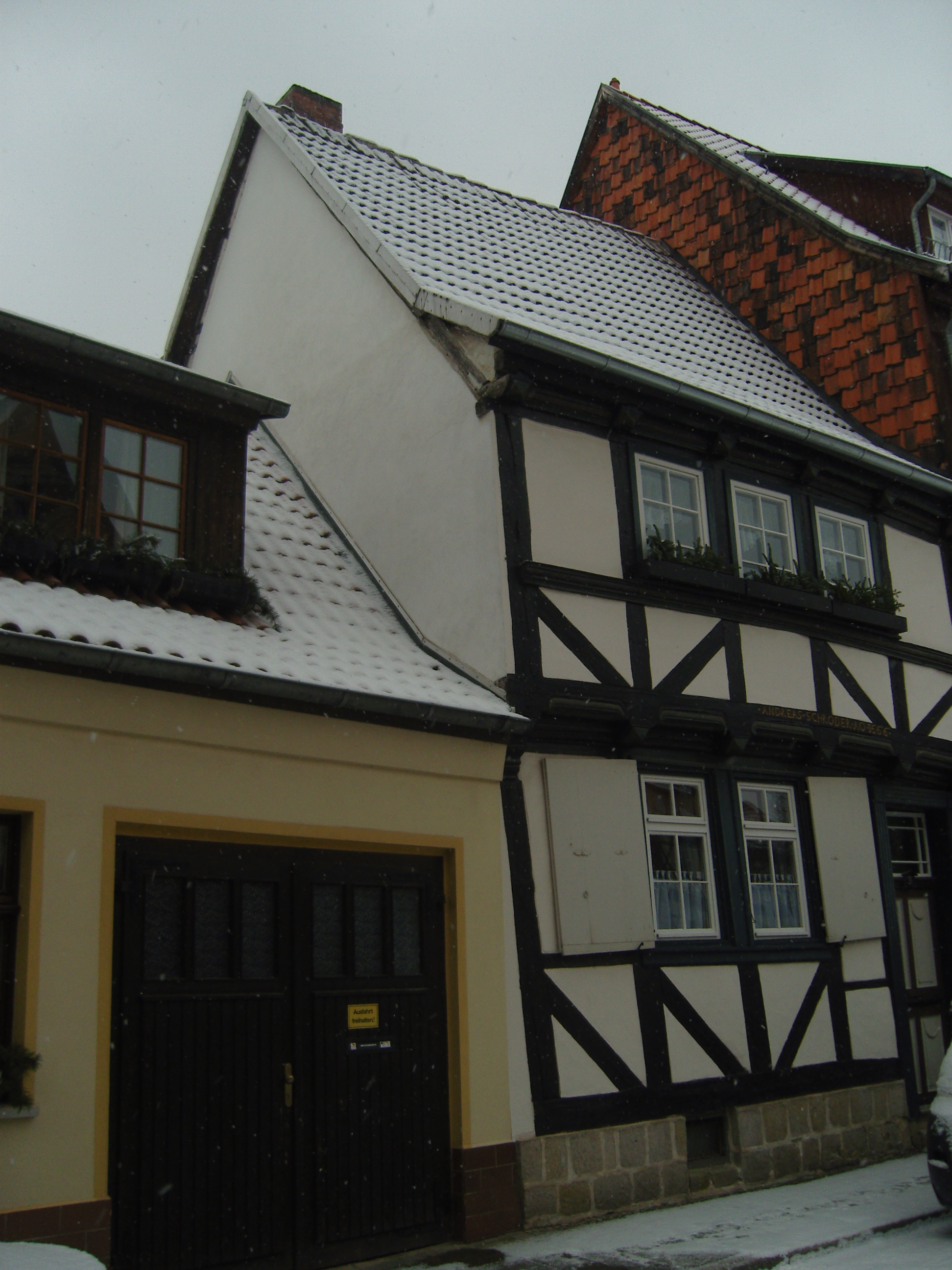 Denkmalgeschütztes Fachwerkgebäude in der Schulstraße 9 in Quedlinburg